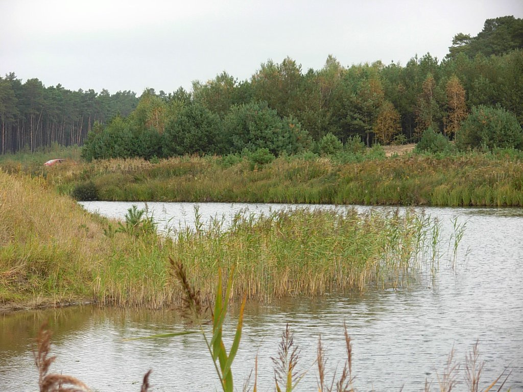 Zbiornik ppoż w Puszczy Bydgoskiej